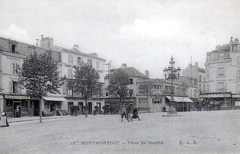 Montmorency (France) - La place du marché vers 1900